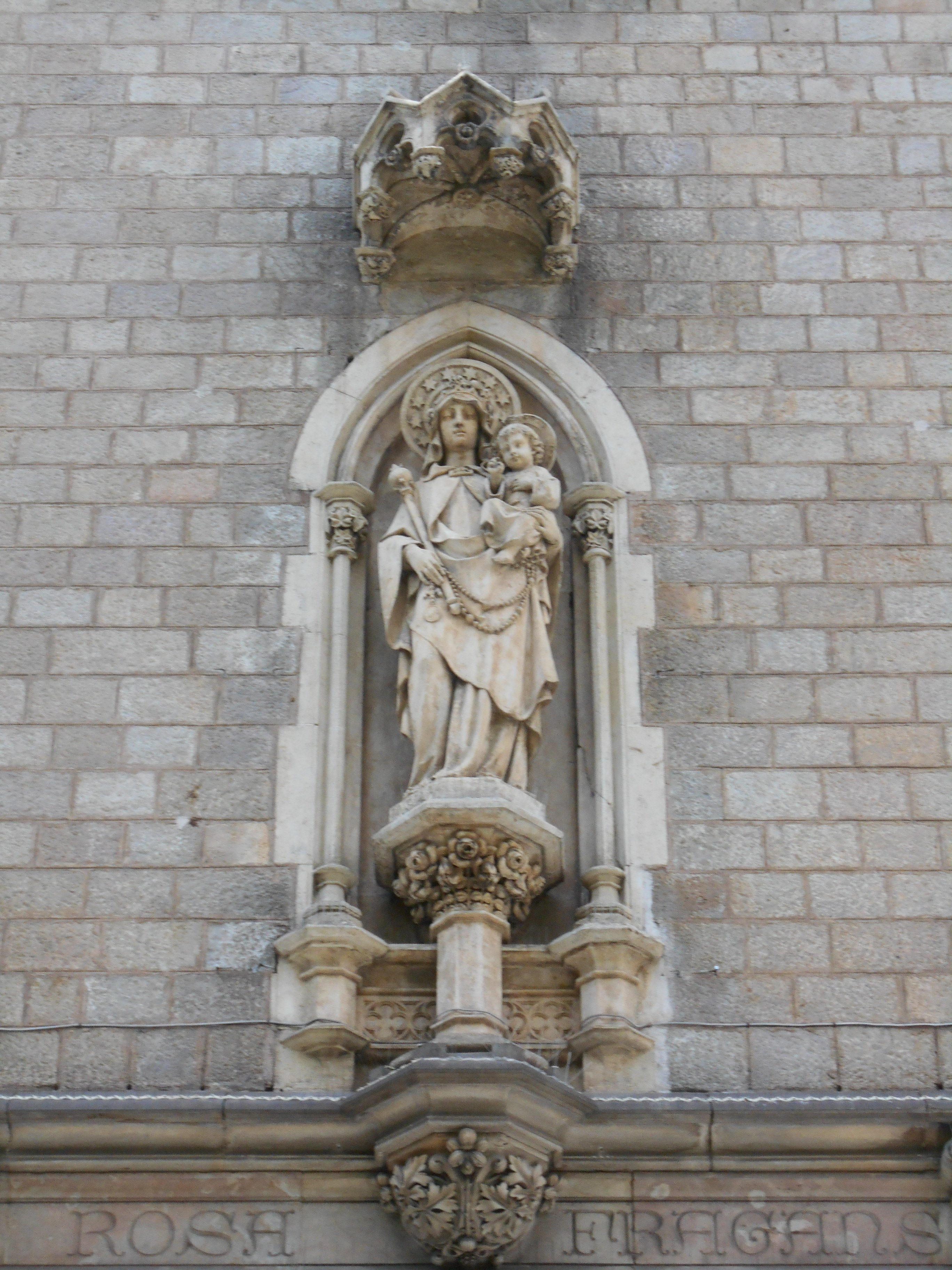 Iglesia de San Raimundo de Peñafort, escultura de la Virgen del Rosario, de Maximí Sala.